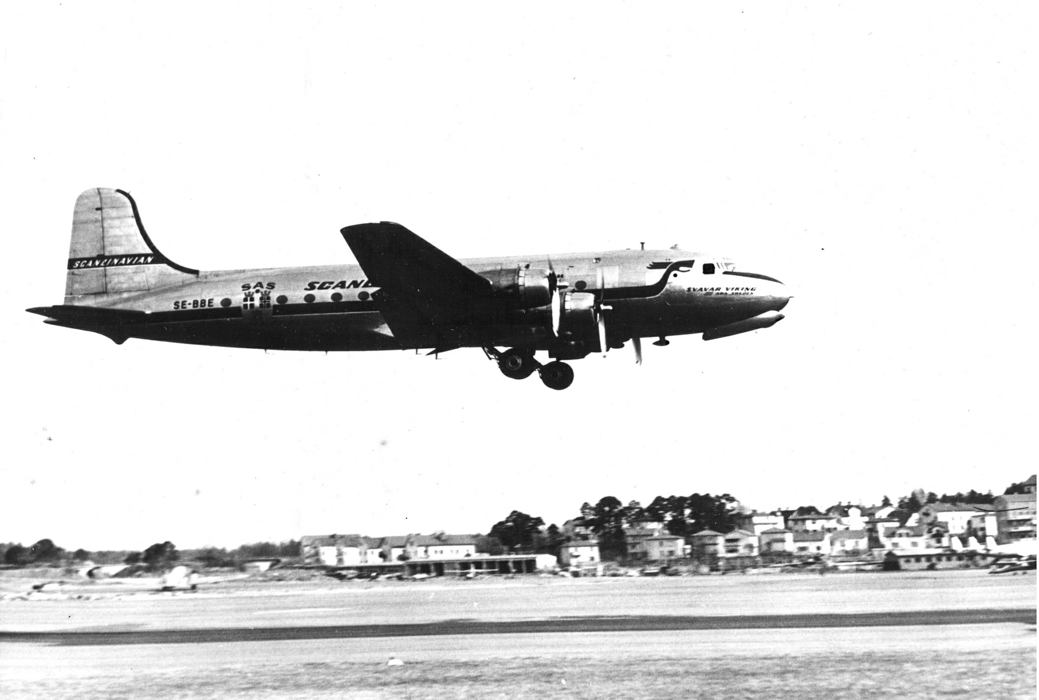 DC-4 ASvavar Viking, landing at Bromma.